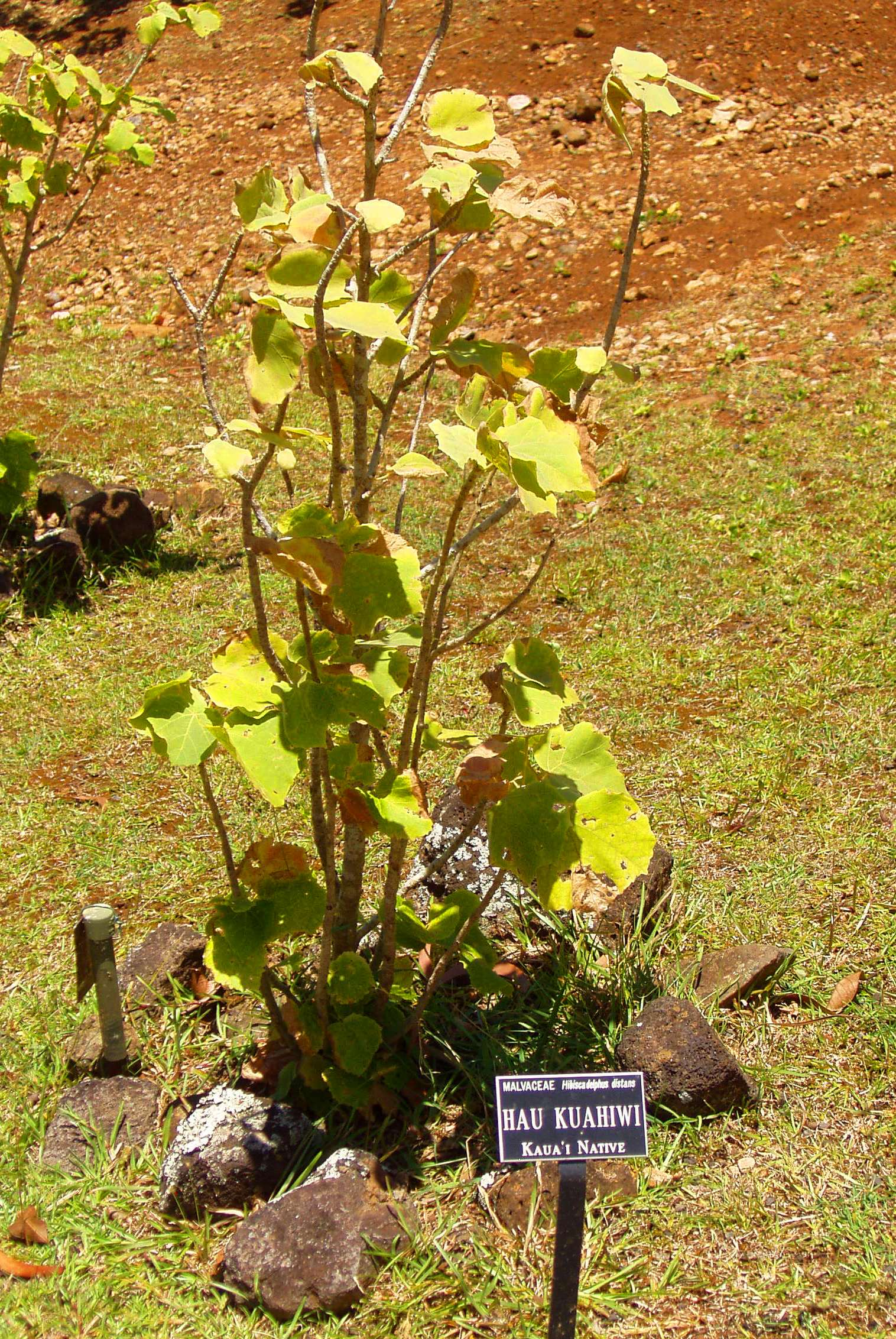 Hibiscadelphus distans (Limahuli Garden and Preserve, Kauai, Hawaii).